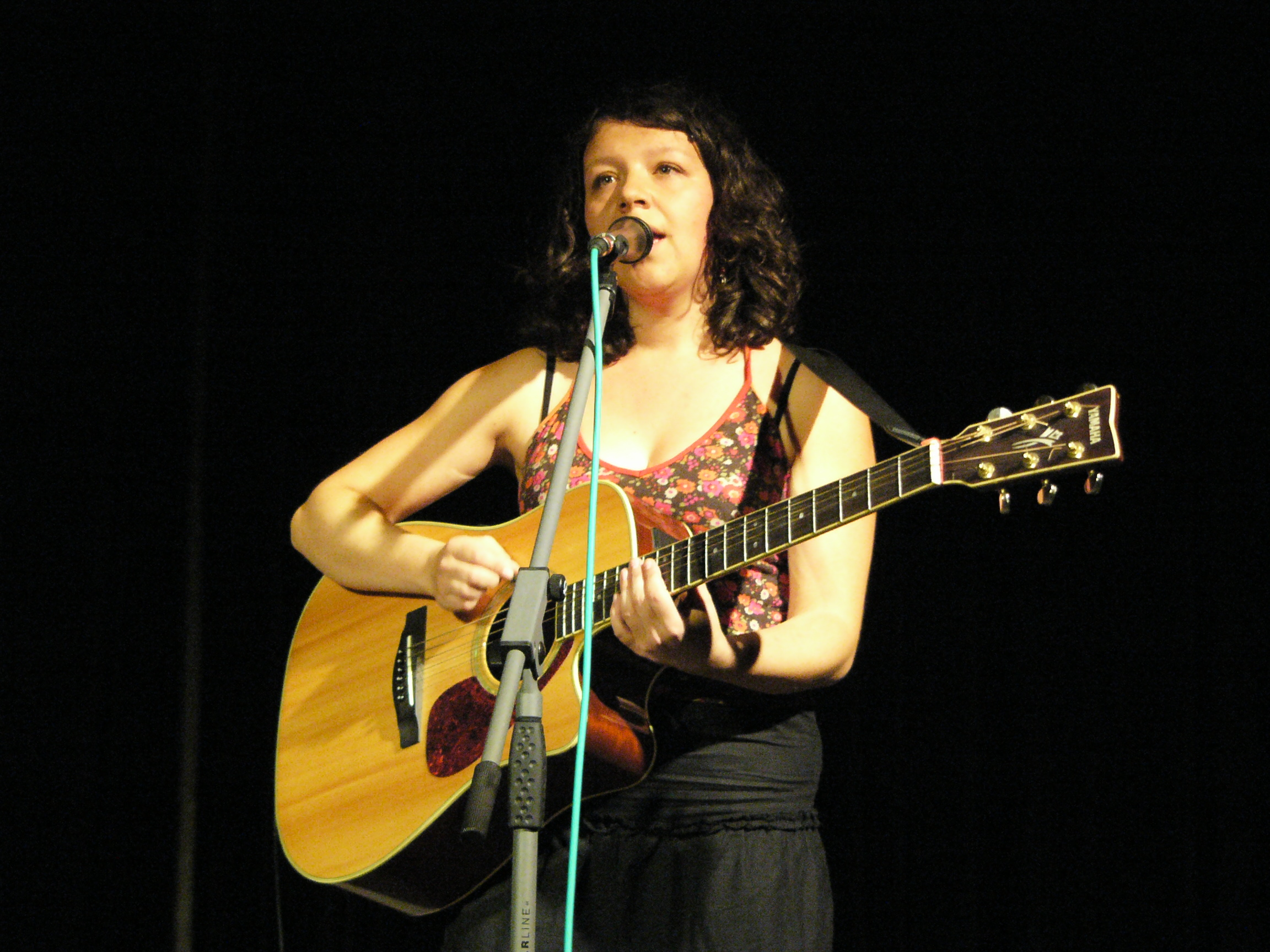 Sestry Steinovy.